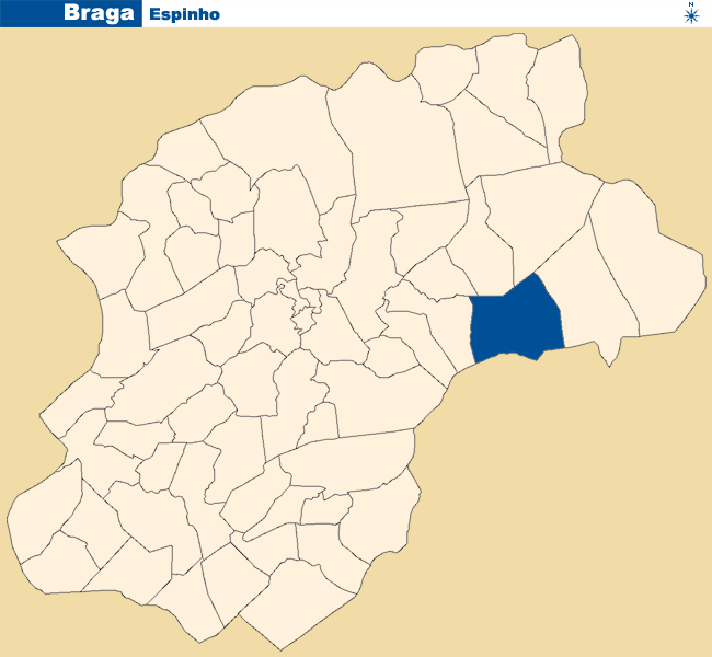 Localização de Espinho no concelho de Braga.